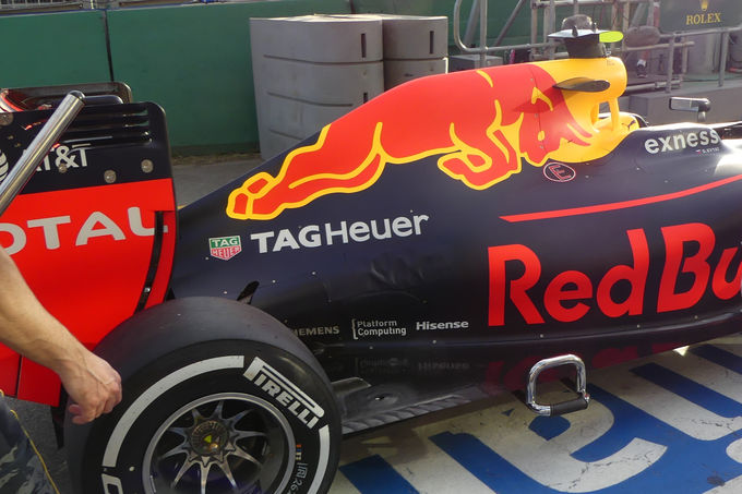 označenie motora Renault pre sezónu 2016